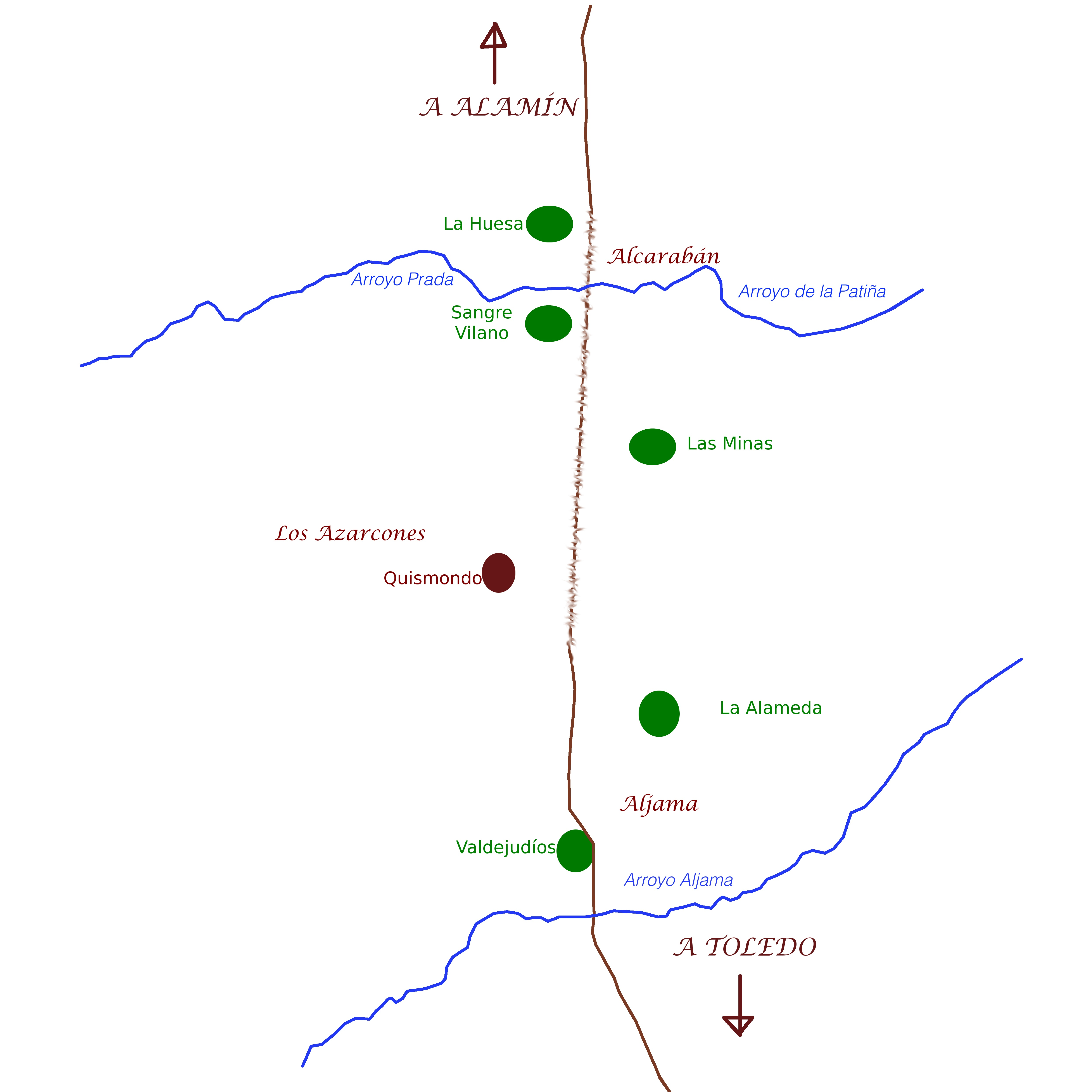 representación yacimientos